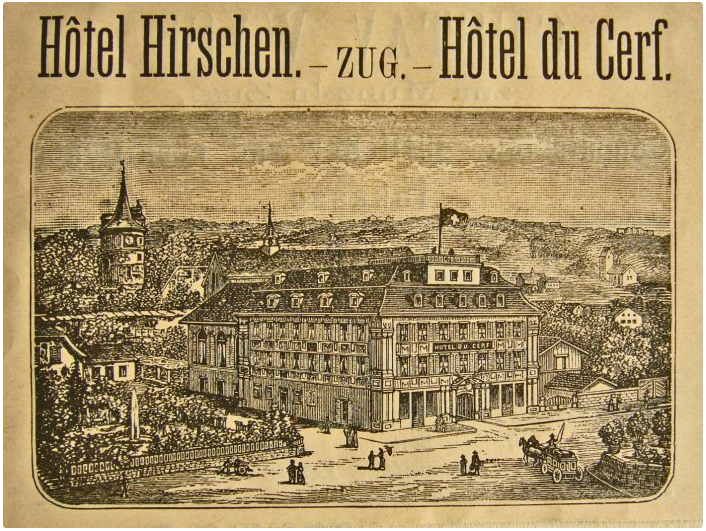 Hotel Hirschen in der Stadt Zug (Schweiz). Holzstich, Werbung um 1900. Bildgrösse: 5,6 x 9 cm